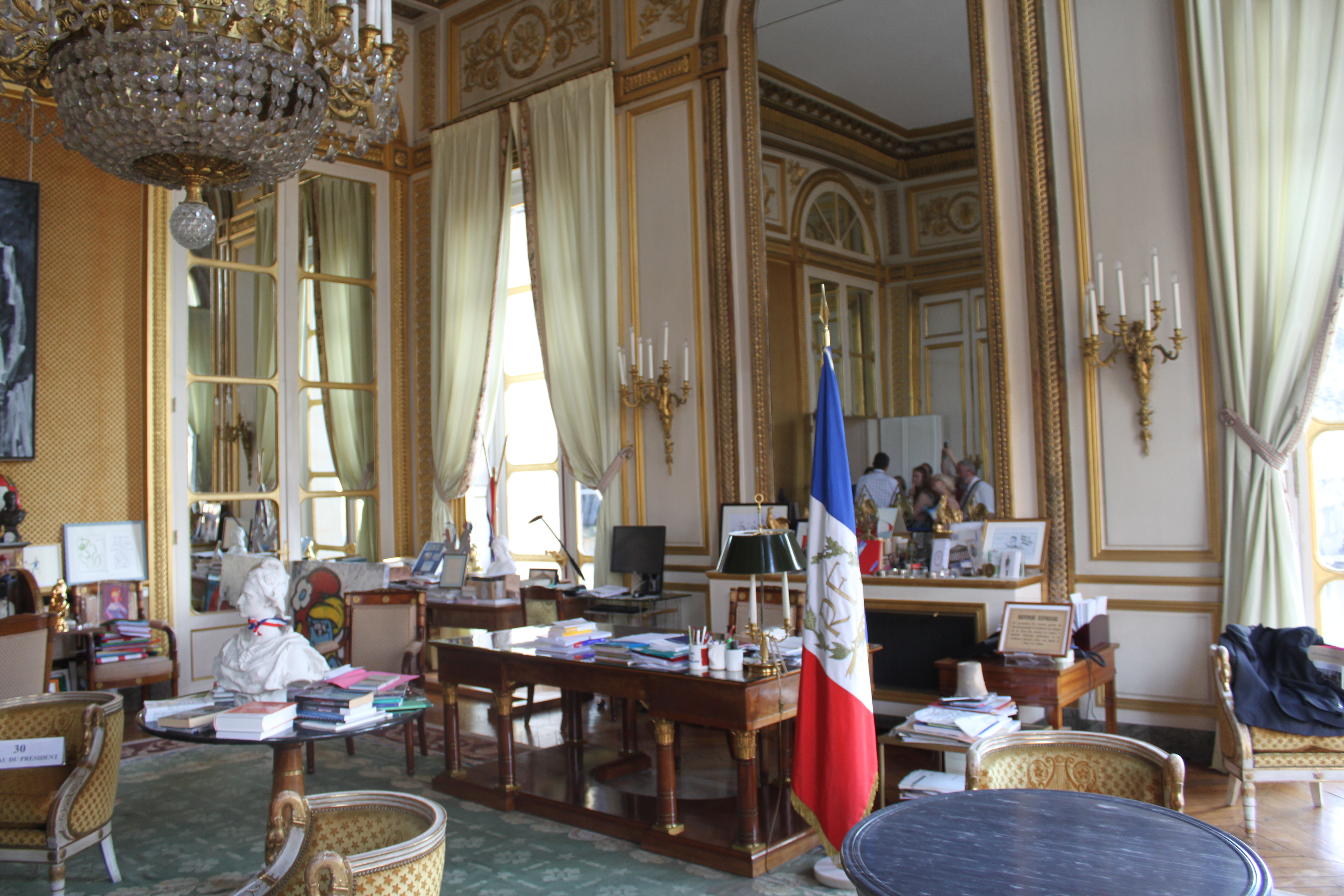 Bureau du Président du Conseil Constitutionnel (Paris) en septembre 2014. Cette pièce a été le salon de musique du duc de Chartres puis la chambre à coucher de la princesse Clotilde de Savoie, épouse de Jérôme Napoléon. Le bureau du Président est d'époque Empire.